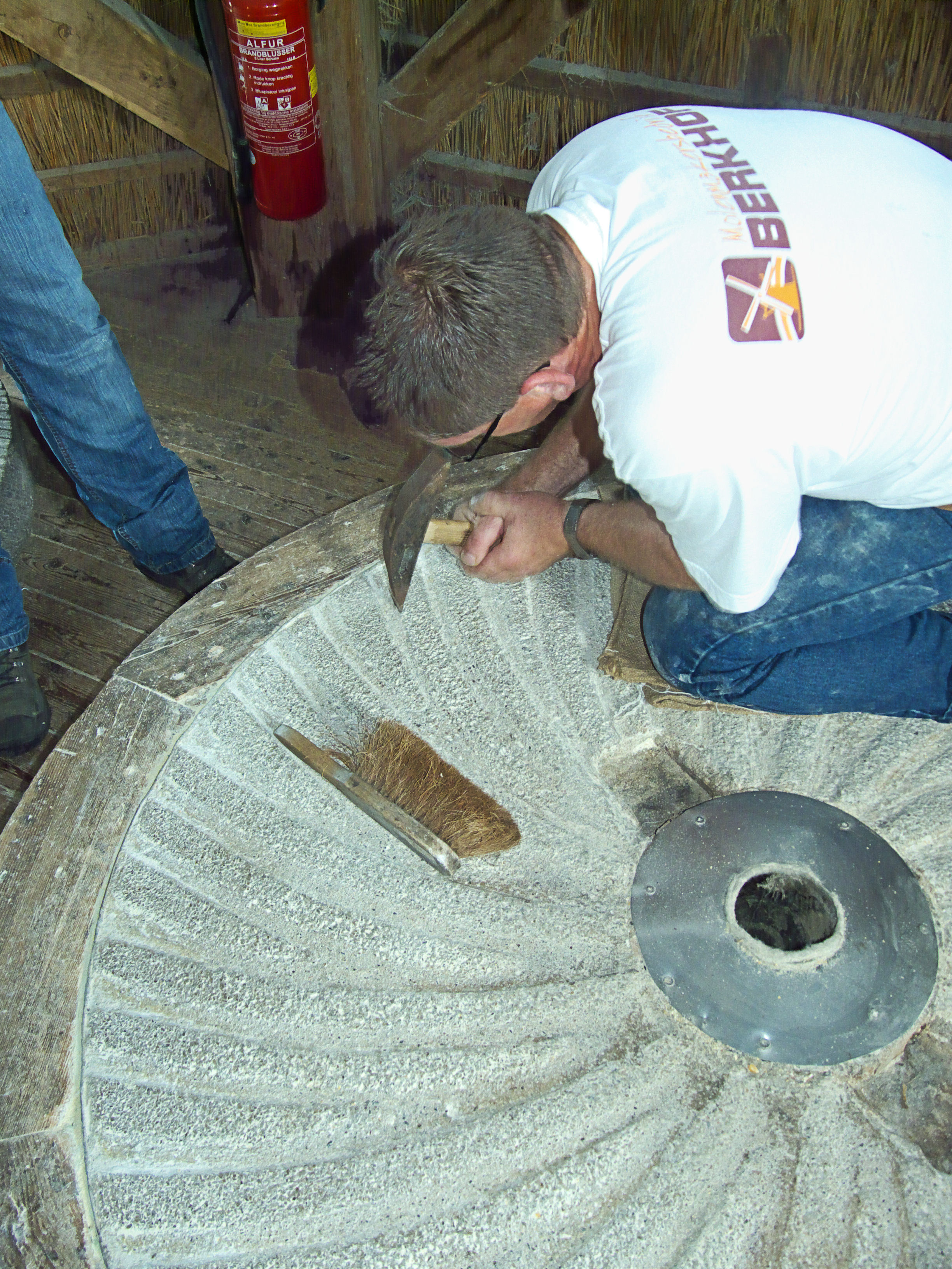 Walderveensemolen steenbillen, Walderveen, Gelderland, the Netherlands